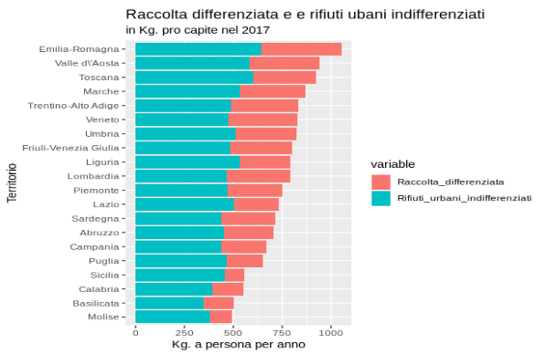 file realizzato con RStudio con i seguenti dati